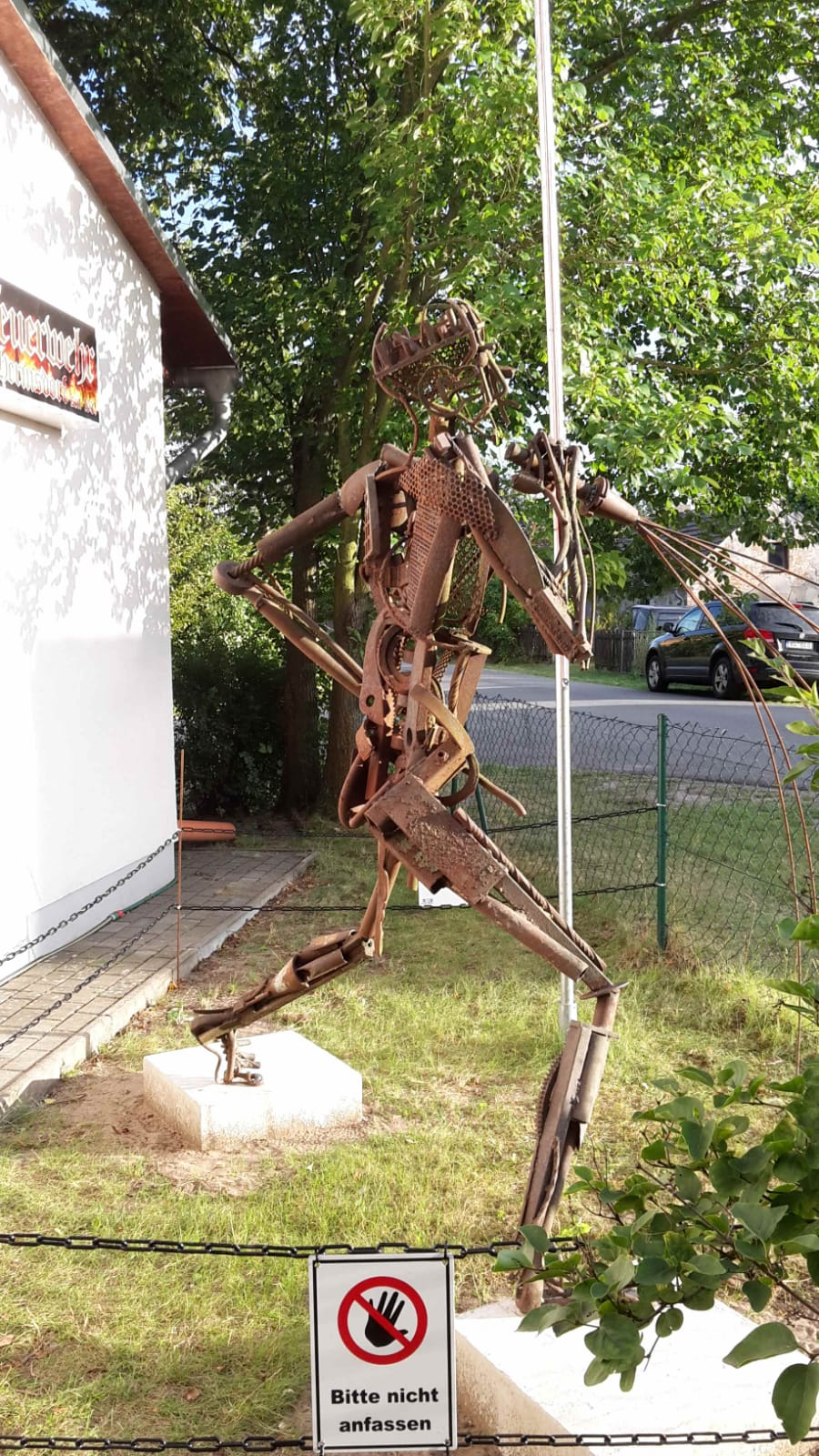 Statue des heiligen Florian vor der Feuerwehr